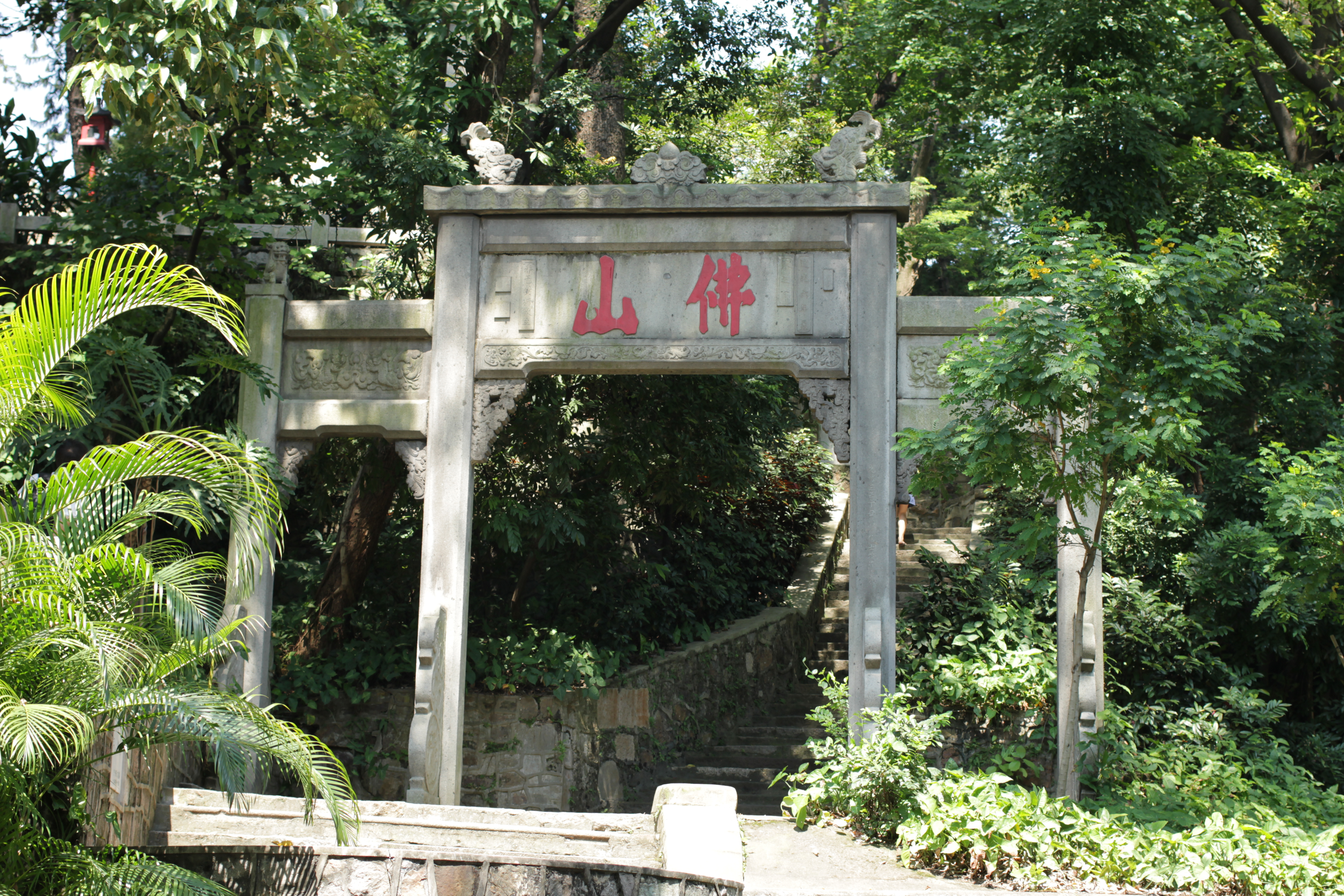 越秀山佛山牌坊。